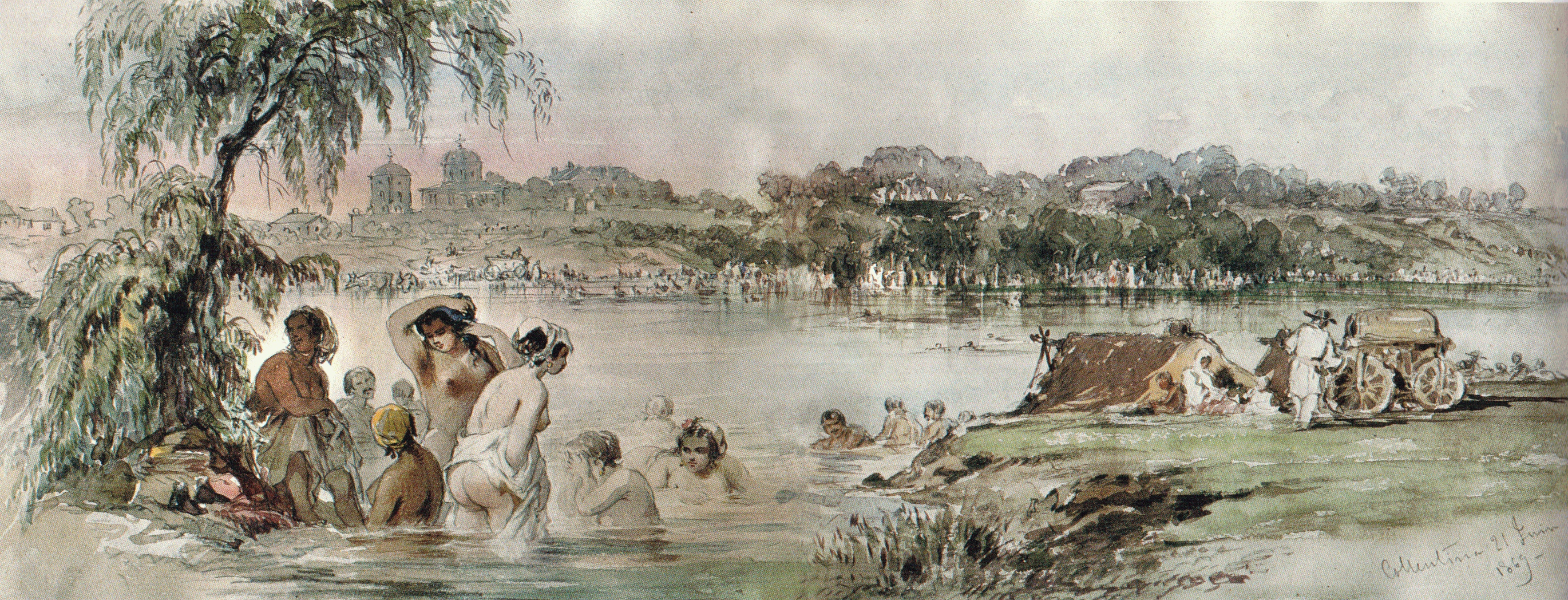 Colentina